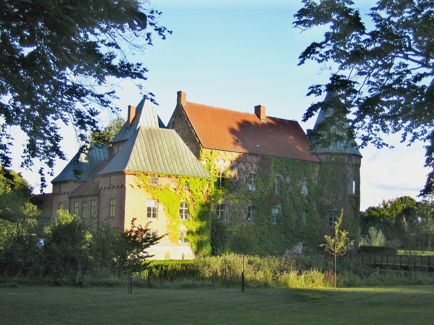 Örtofta slott. Bilden tagen av mig själv 17 september 2005.